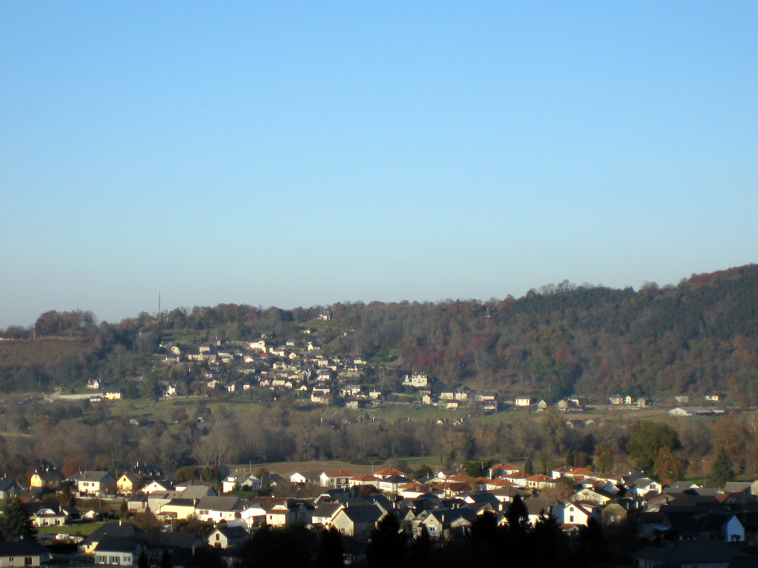 Bescat vu depuis le promontoire dédié à Saint Michel (Arudy) (Pyrénées-Atlantiques) (Pyrénées).